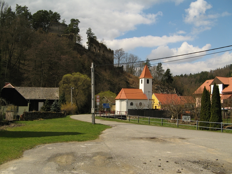 Kaple sv. Jana a Pavla (Podhradí nad Dyjí), Podhradí nad Dyjí